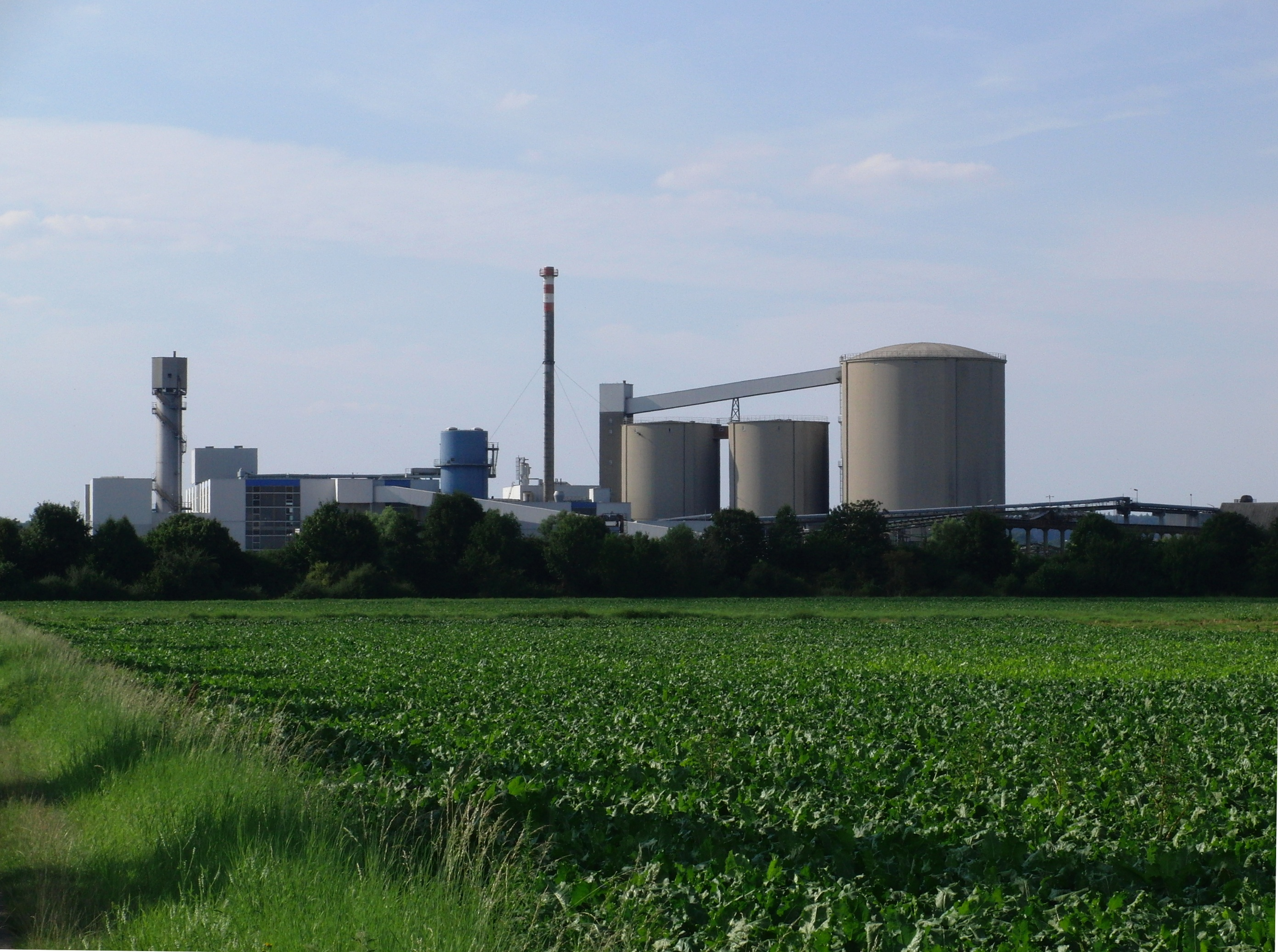 Waberns Zuckerfabrik (Wabern, Nordhessen)